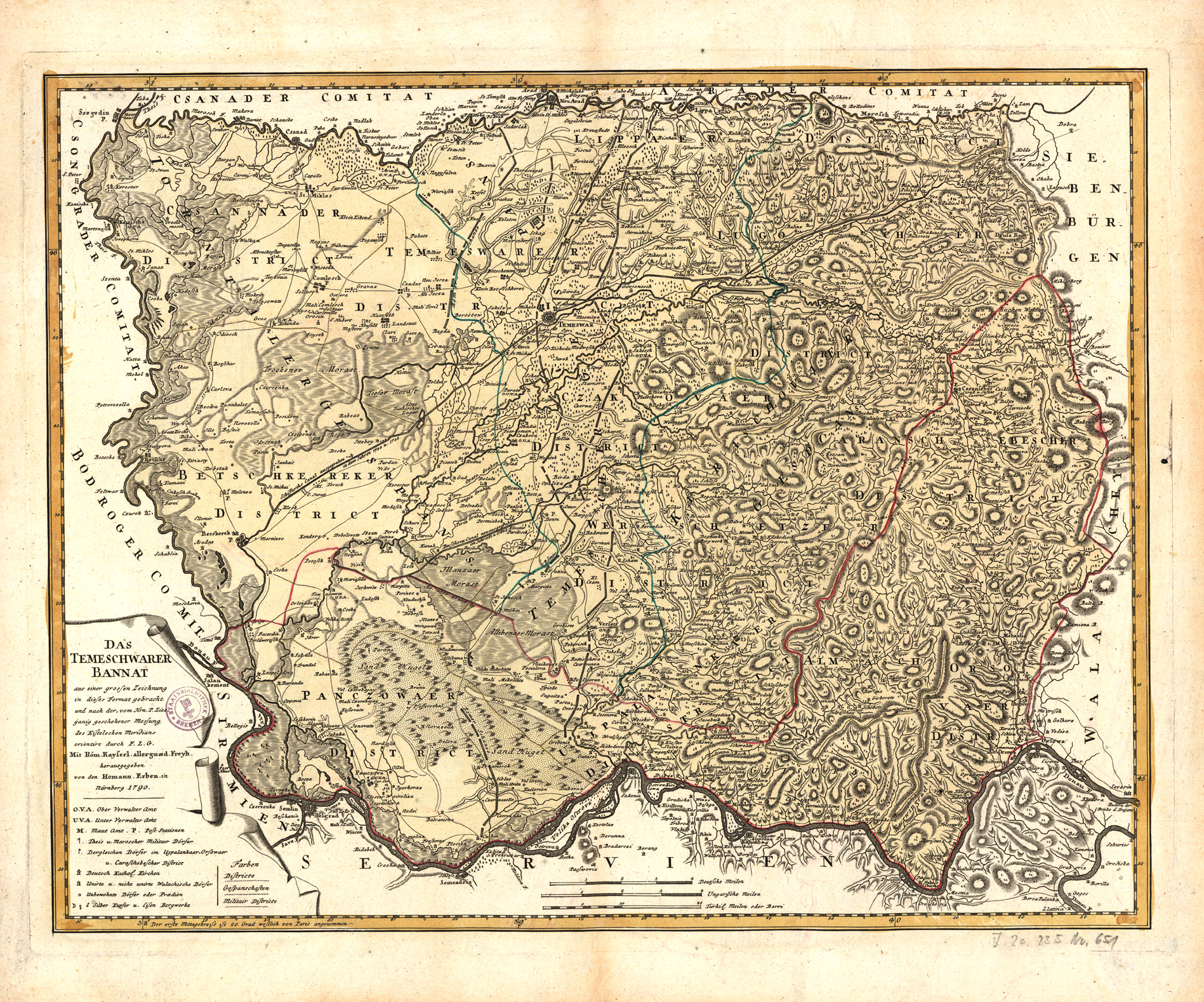 Temesköz térképe 1790